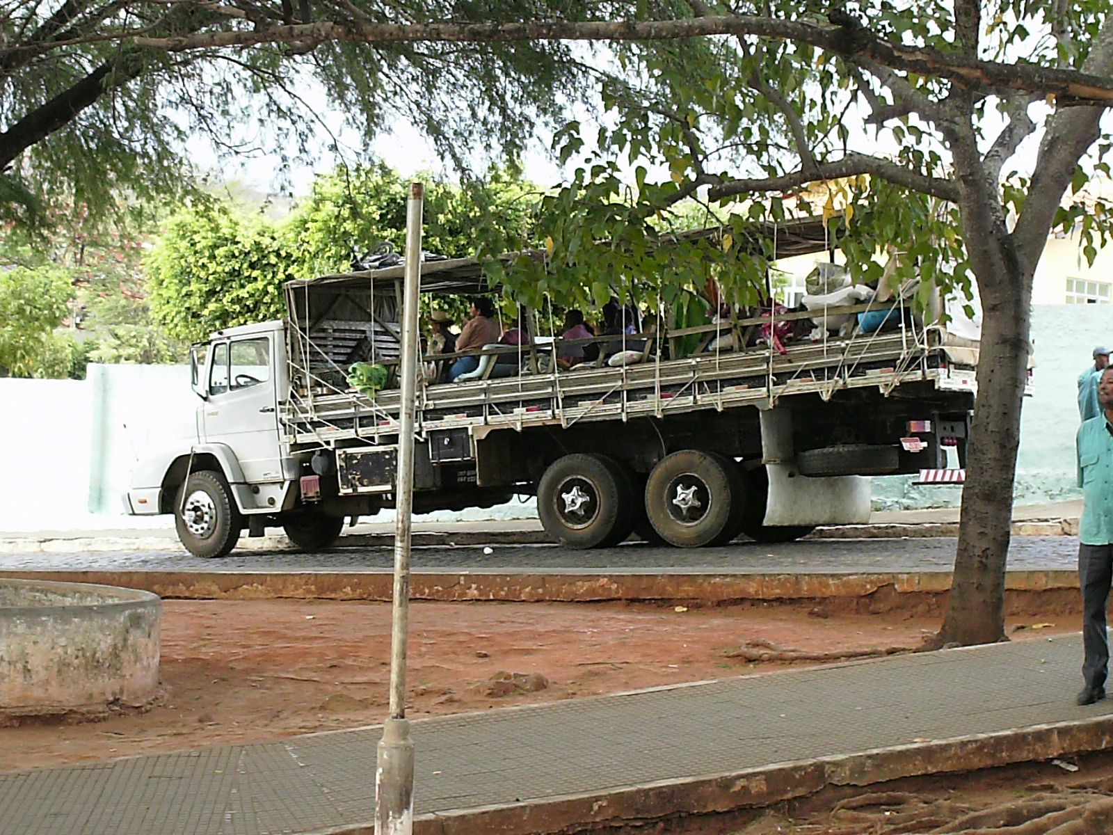 Transporte irregular de passageiros, no Nordeste do Brasil, conhecido por pau-de-arara, durante romaria a Bom Jesus da Lapa (Bahia).